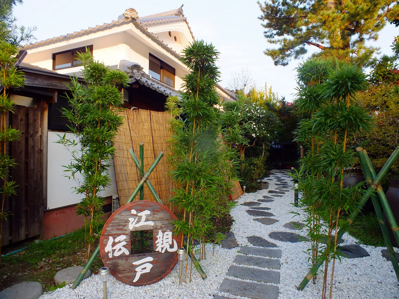 Edoshinden Company（丹波篠山江戸親伝）篠山市乾新町